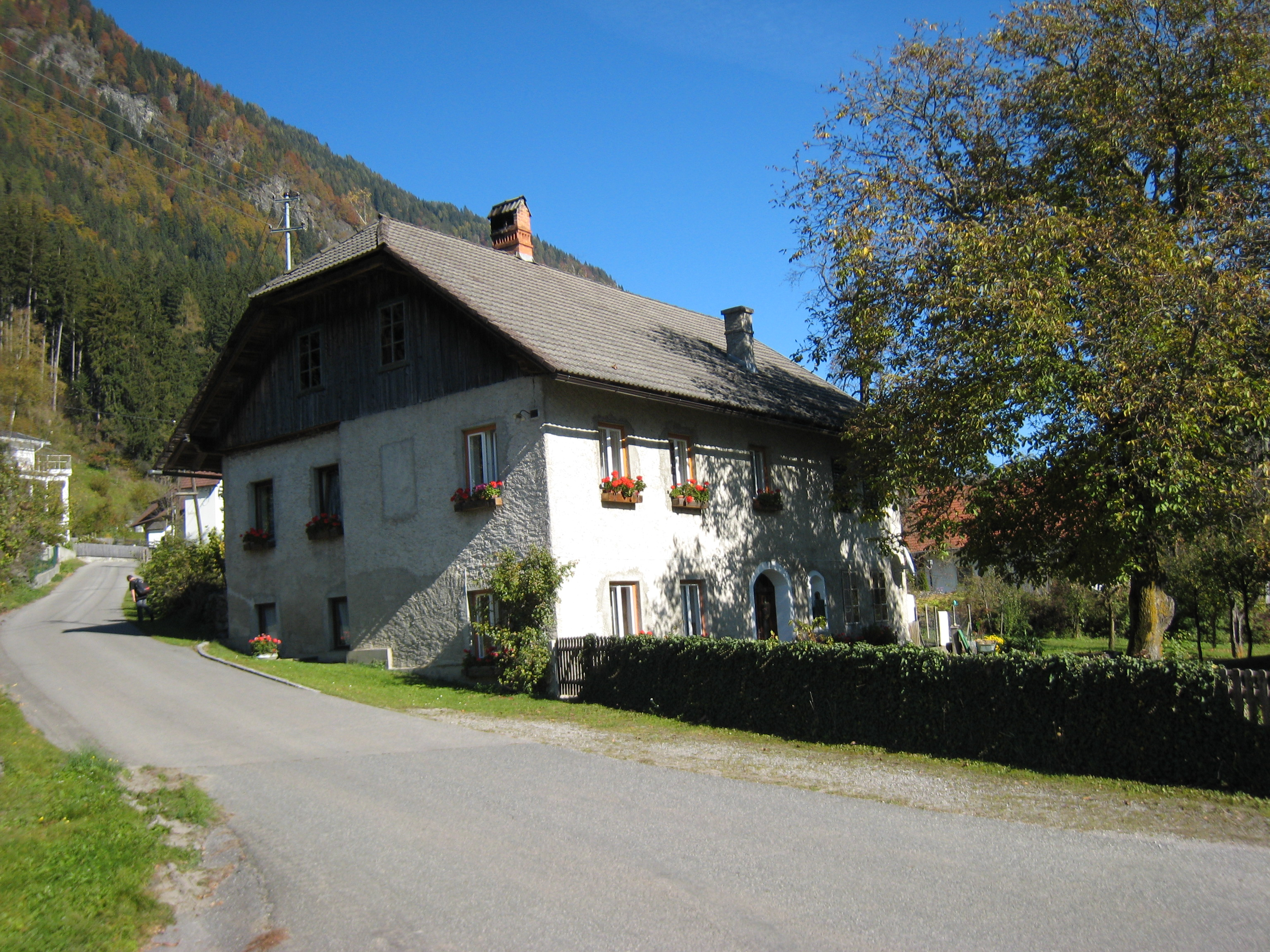 Bauernhaus in Gerlamoos